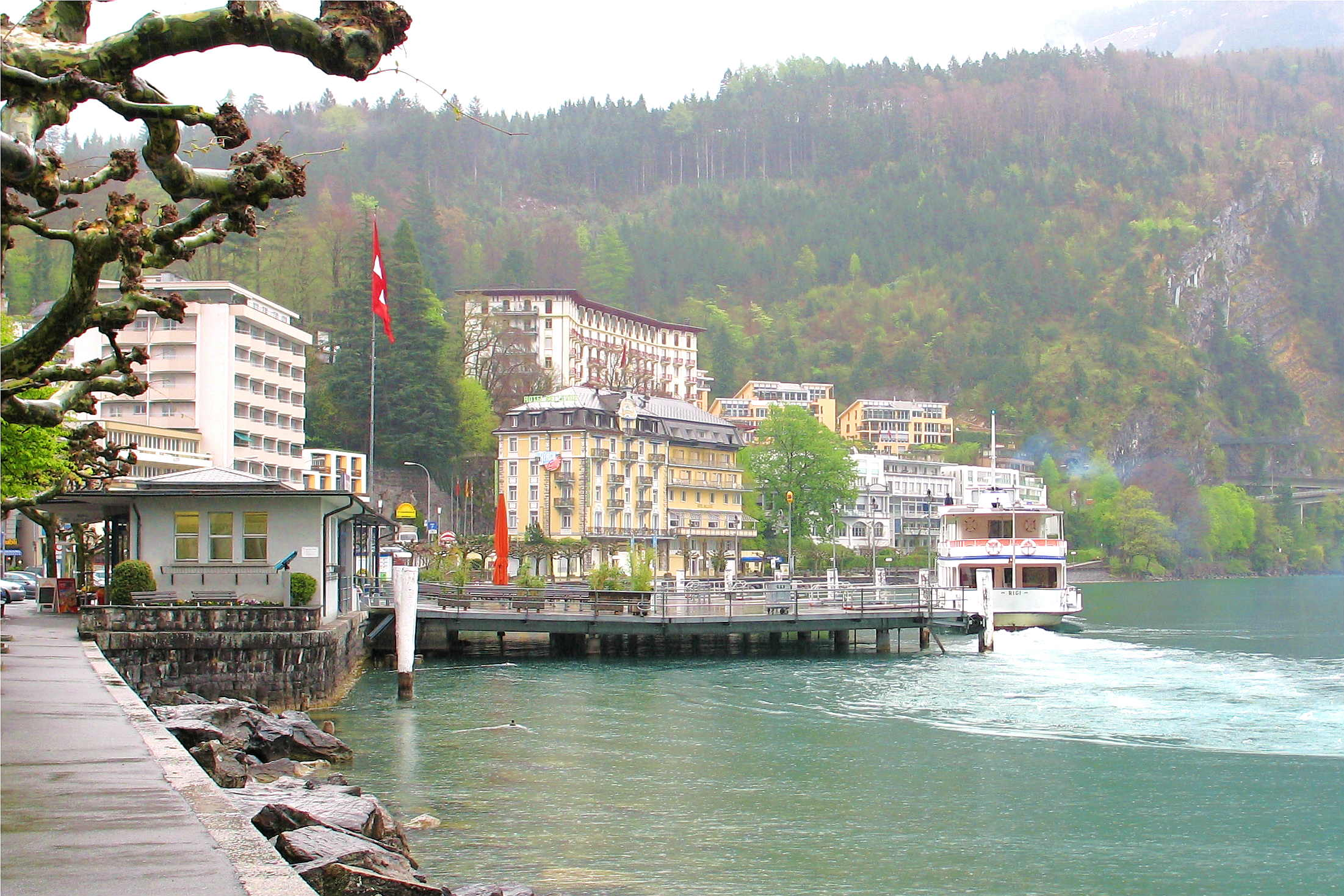 Brunnen (Schwäiz)